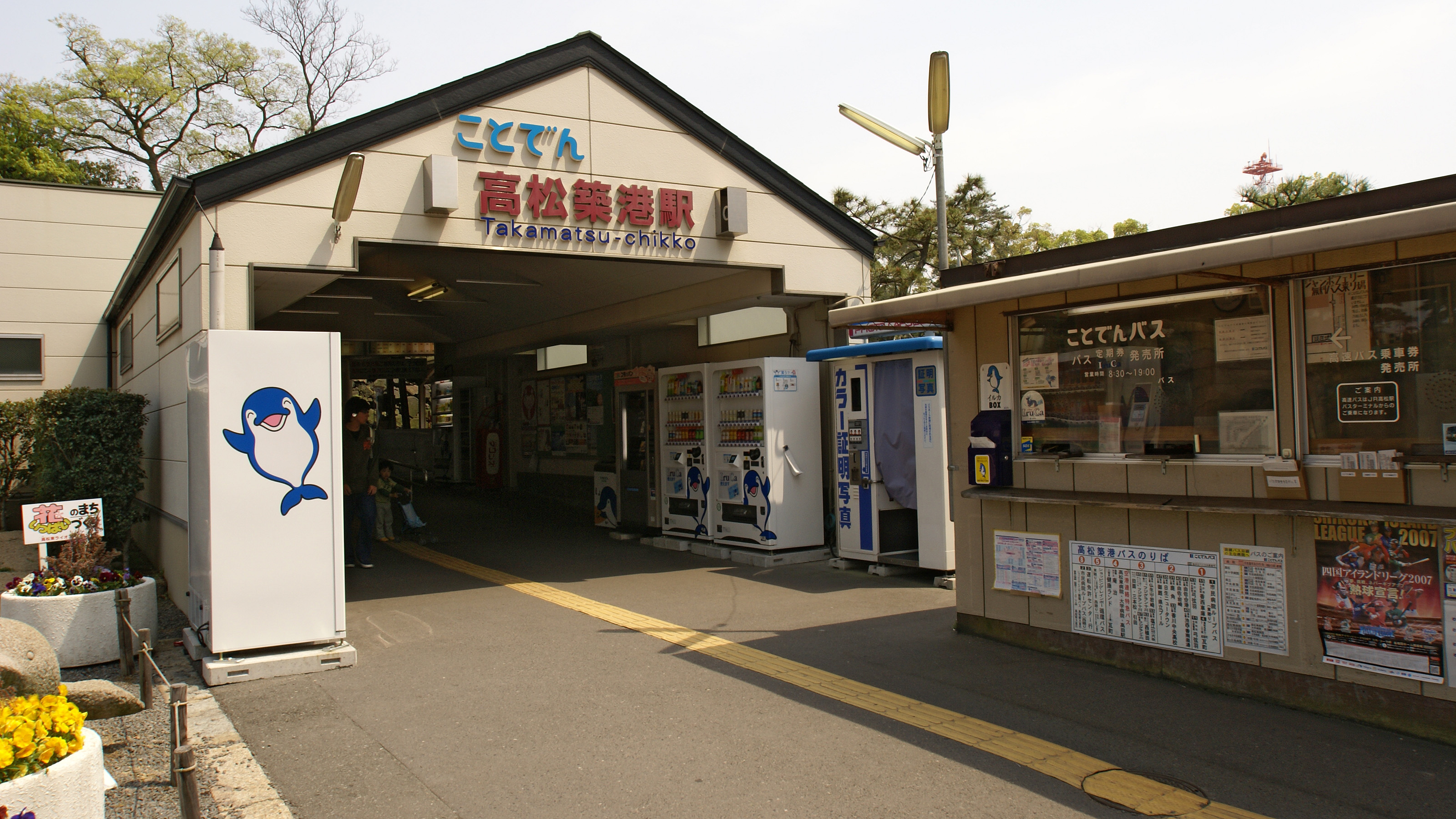 Takamatsu-chikko Station in Takamatsu, Kagawa, Japan